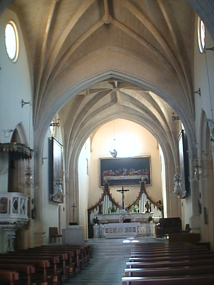 Interno della chiesa di Sant'Eulalia, Cagliari